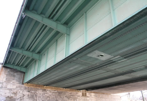 Hohlkastenträger mit orthotroper Deckplatte der Deutzer Brücke in Köln